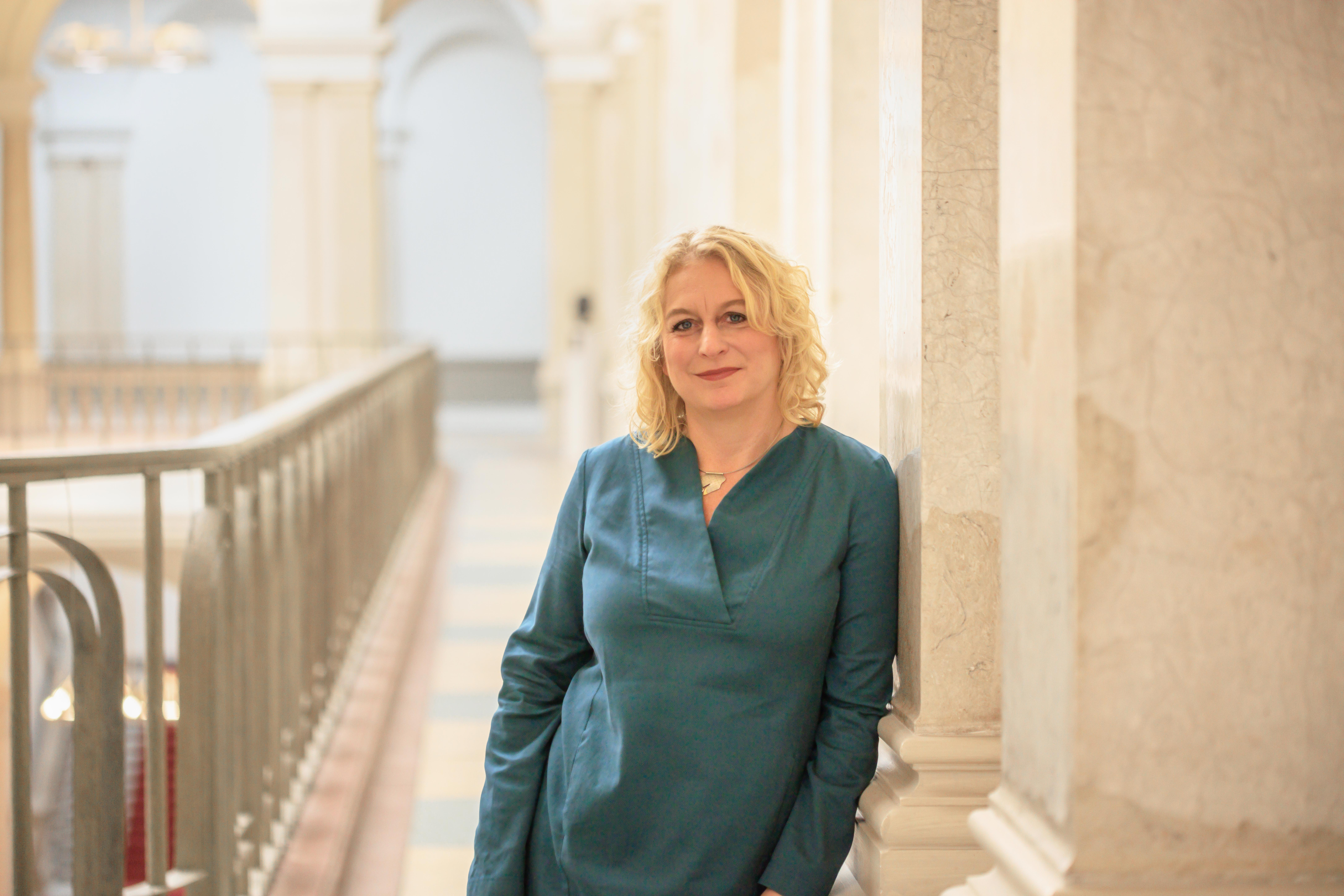 Nicole Ludwig, Abgeordnete der Grünen-Fraktion Berlin